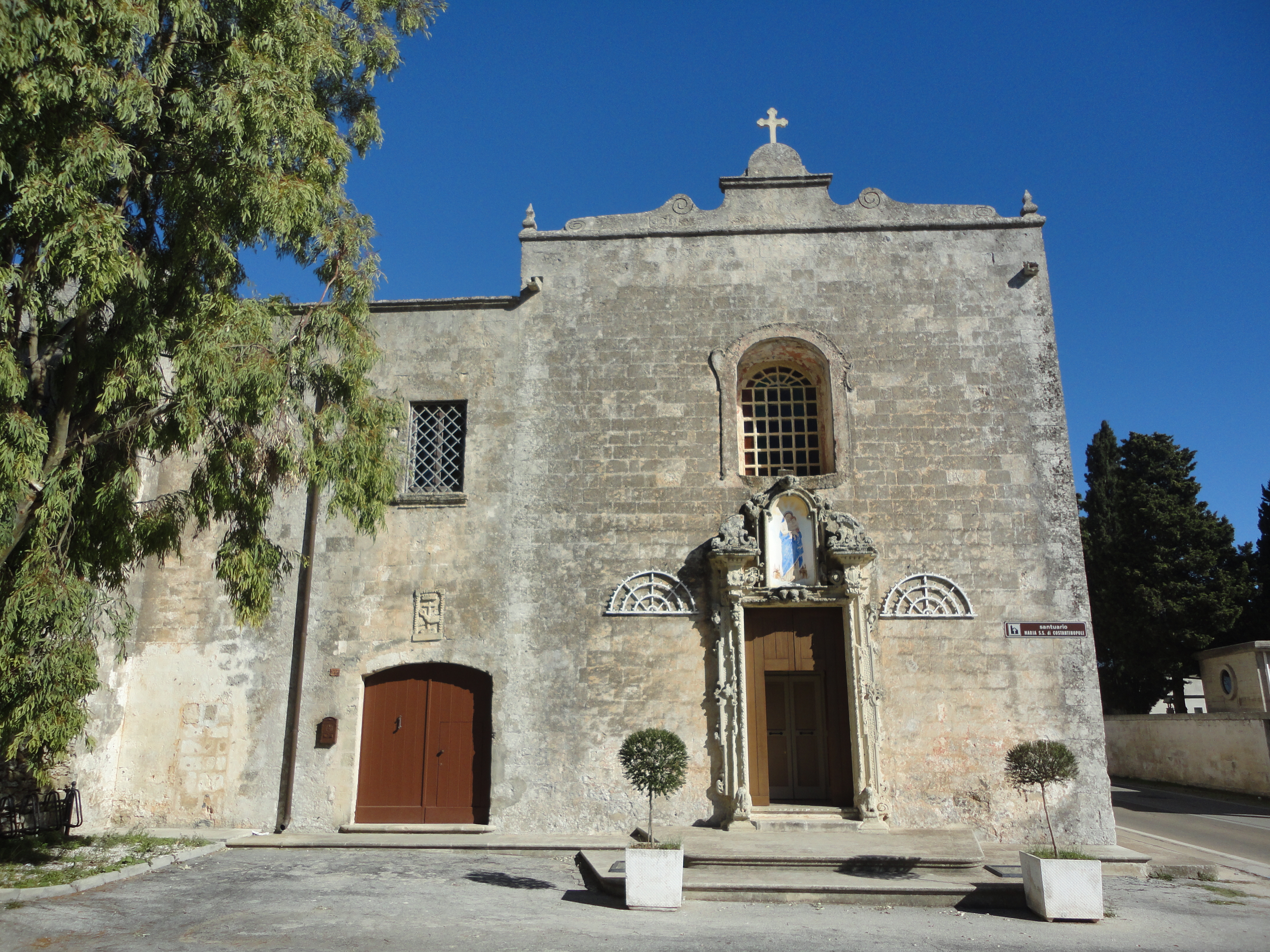 Chiesa santuario Madonna di Costantinopoli Marittima, Lecce